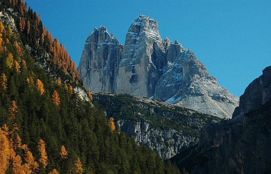 Blick von Westen durchs Höhlensteintal auf die Drei Zinnen (Südtirol)